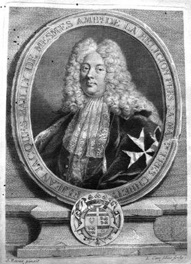 Jean-Jacques de Mesmes